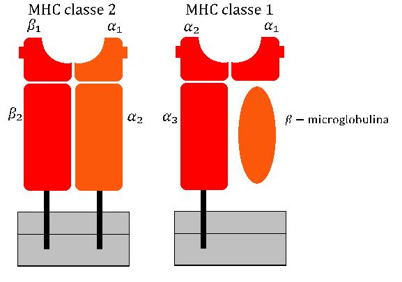 MHC classe 1 i 2